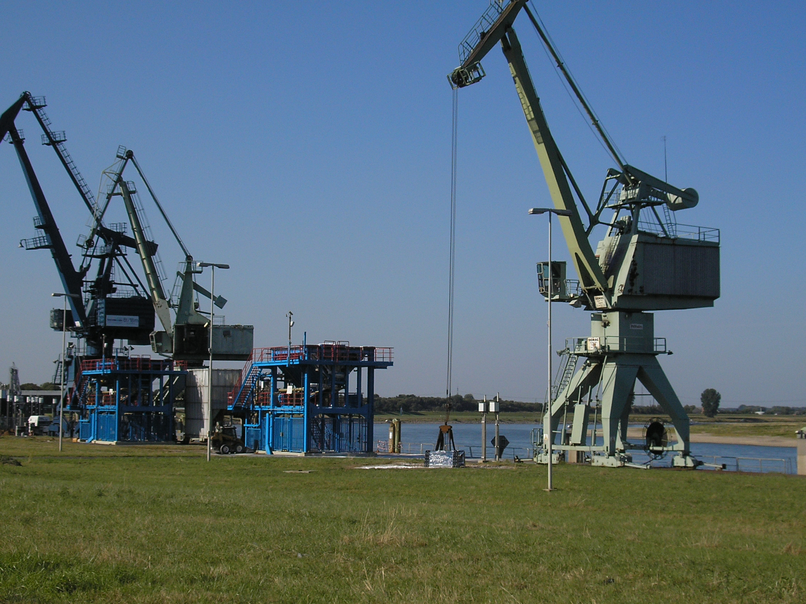 Krananlagen im Bereich der Hafenanlagen in Köln-Worringen.